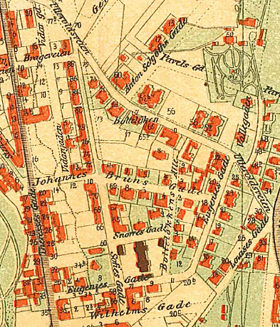 Kart over Bolteløkka.